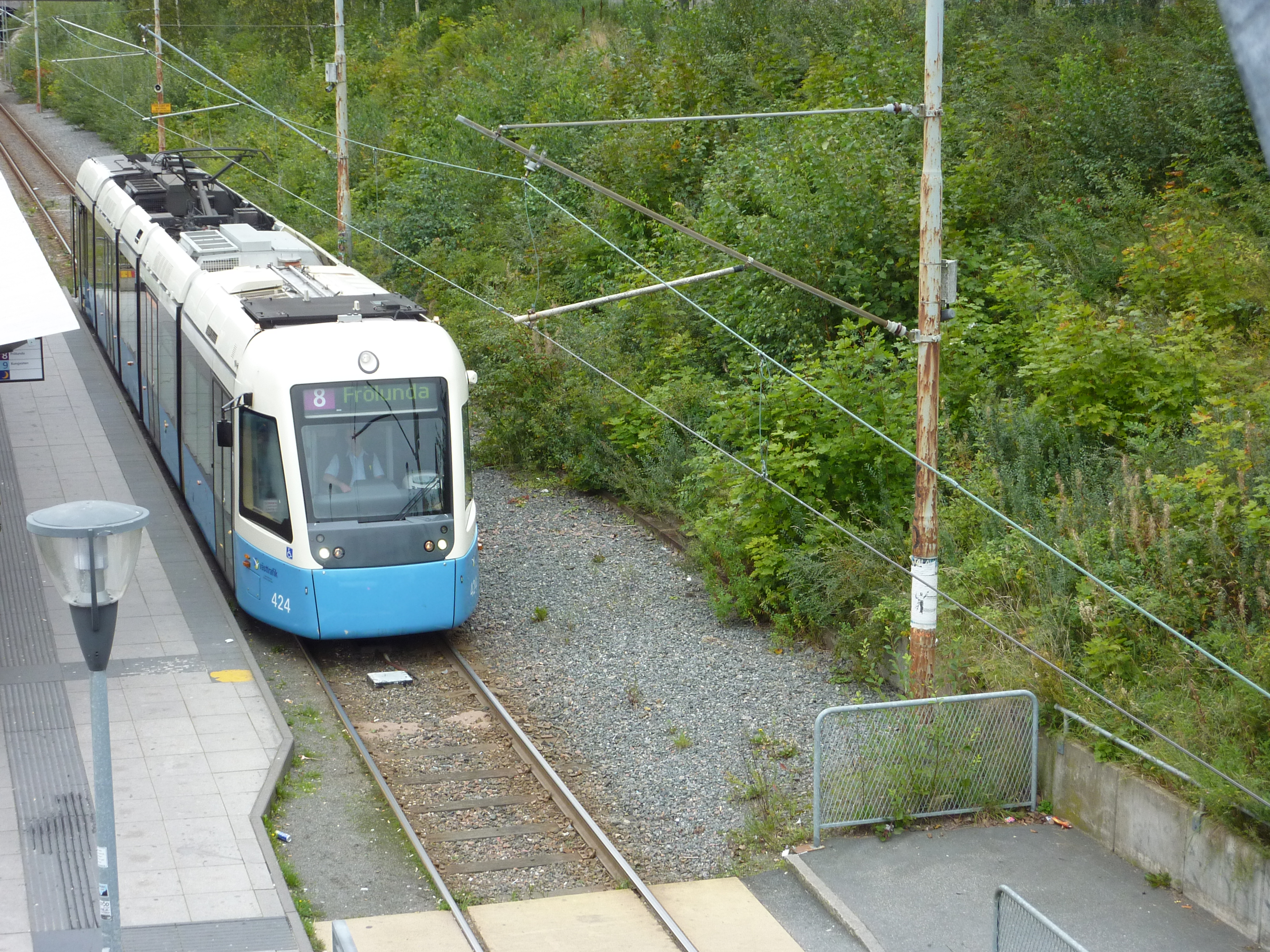 Sirio spårvagn linje 8 Hjällbo